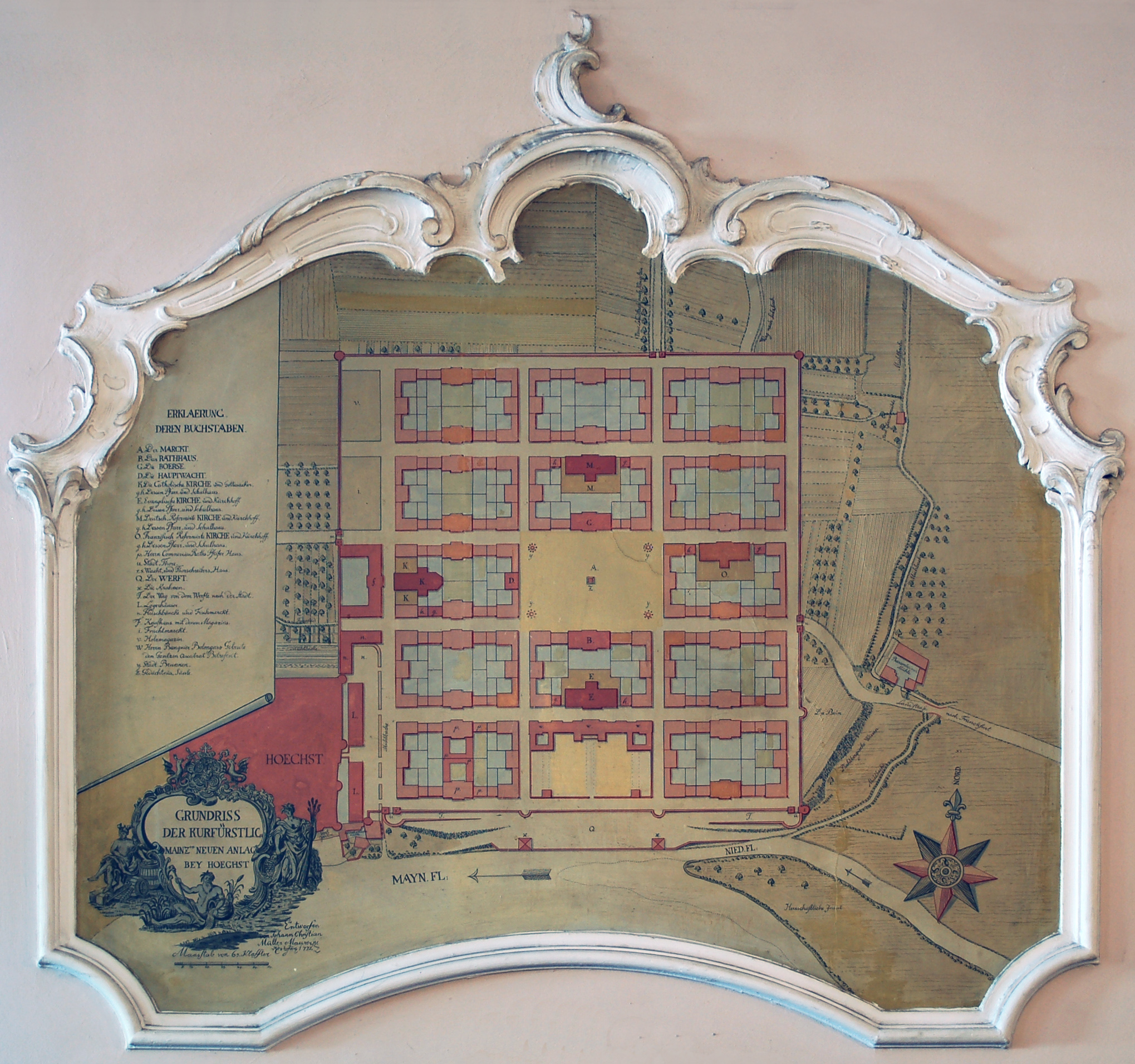 Plan der Neustadt im Höchster Bolongaropalast, Eingangshalle, Ostseite. Das mittlere Karree in der unteren Reihe zeigt die Lage des Palastes im nie realisierten Neustadtprojekt.